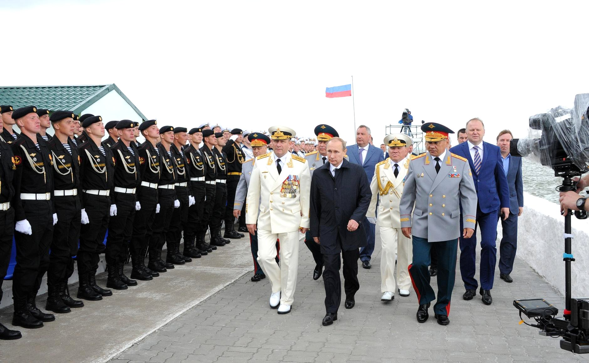 Президент России Владимир Путин на Дне Военно-Морского Флота России в Балтийске